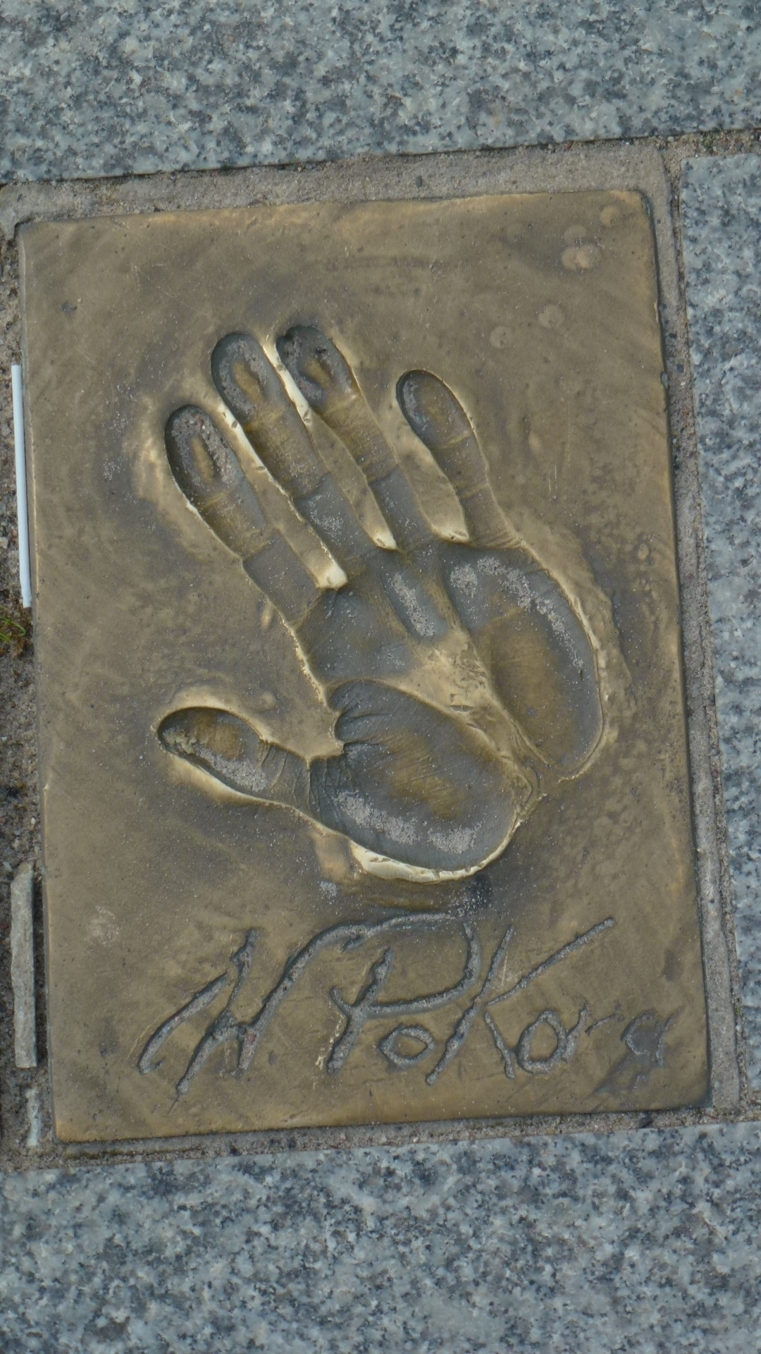 Aktor Wojciech Pokora, odcisk dłoni gwiazdy w Alei Gwiazd w Międzyzdrojach, woj. zachodniopomorskie, pow. kamieński.